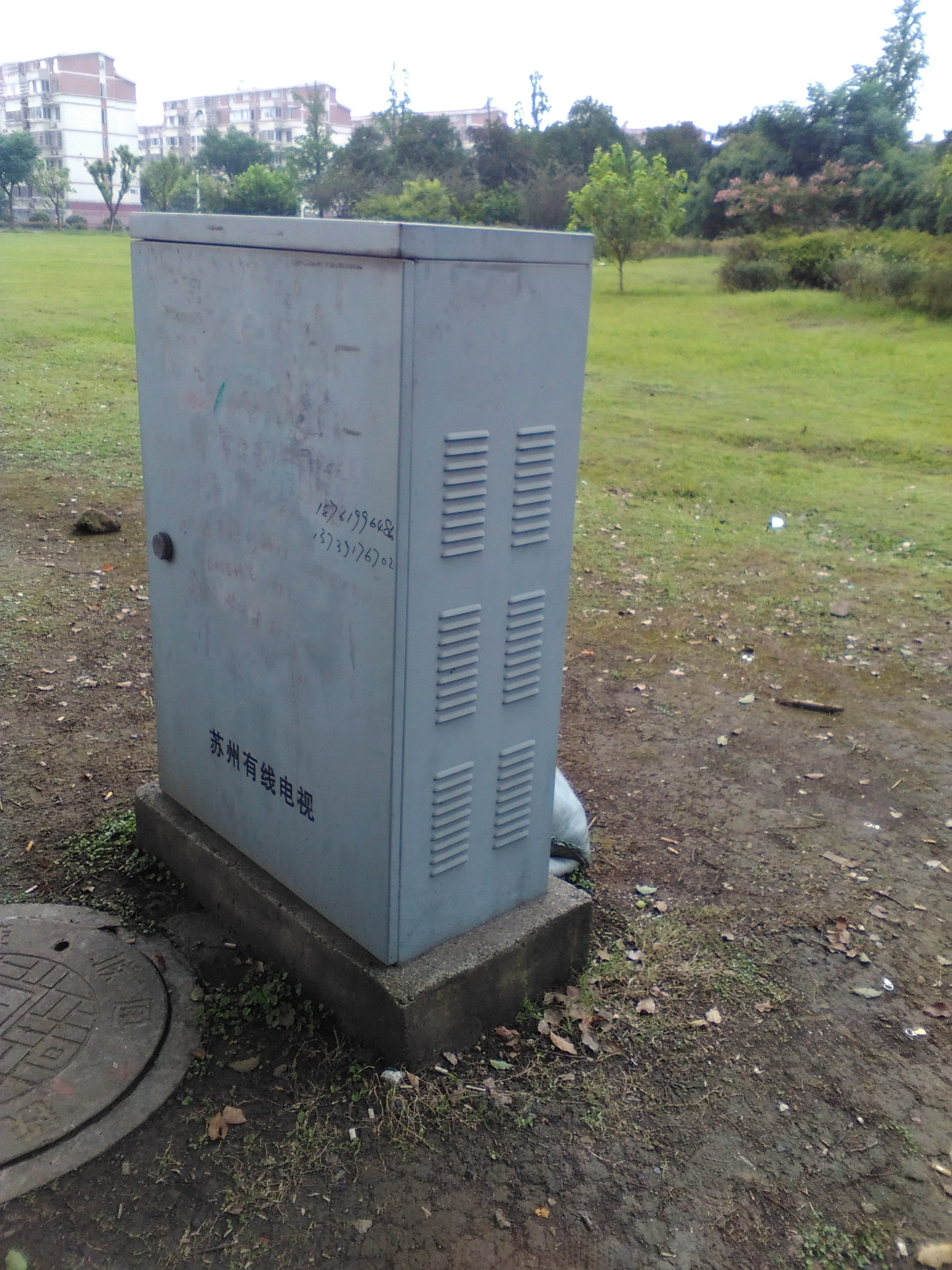 中文（中国大陆）: 原苏州有线电视线箱，位于苏州浒墅关